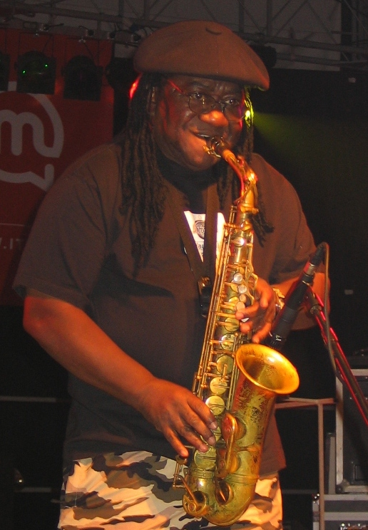 l. sterling